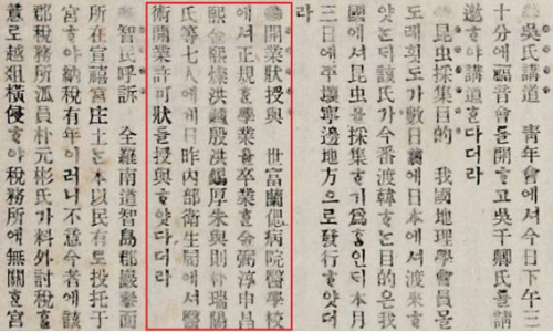 박서양, 신창희 외 5명에게 의사면허 수여를 보도한 기사, "세부란시(世富蘭偲) 병원 의학교에셔 정규한 학업을 졸업한 김필순, 신창희, 김희영, 홍종은, 홍석후, 주현측, 박서양 씨 등 7인에게 일작(日昨) 내부 위생국에셔 의술개업허가장을 수여하얏다"